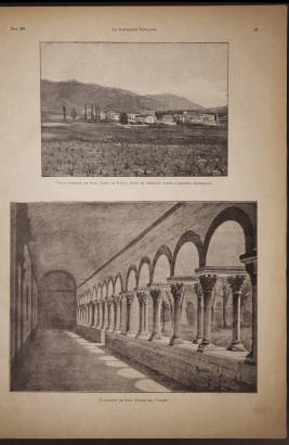 Ilustració Catalana, primera època, número 325 Data: 31 de Març de 1894 pàg. 93